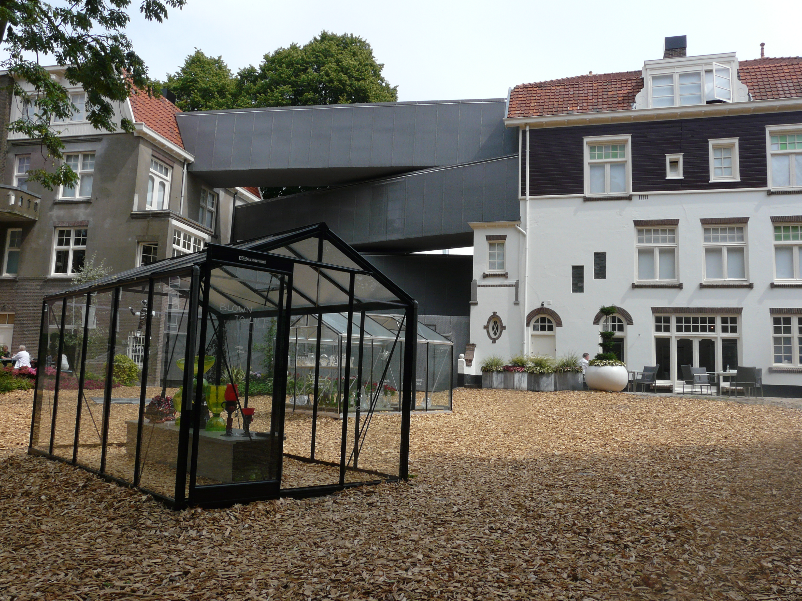 Zicht op een deel van de achterkant en de tuin van het Nationaal Glasmuseum aan de Lingedijk 28-30, 4142 LD Leerdam.